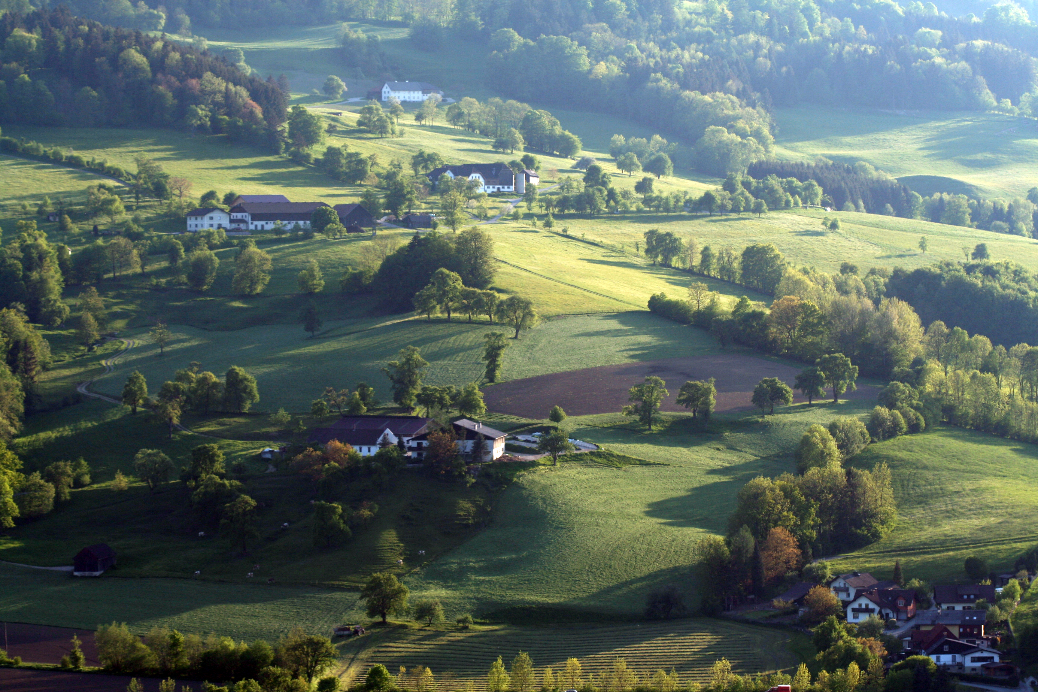 eisenwurzen im mai